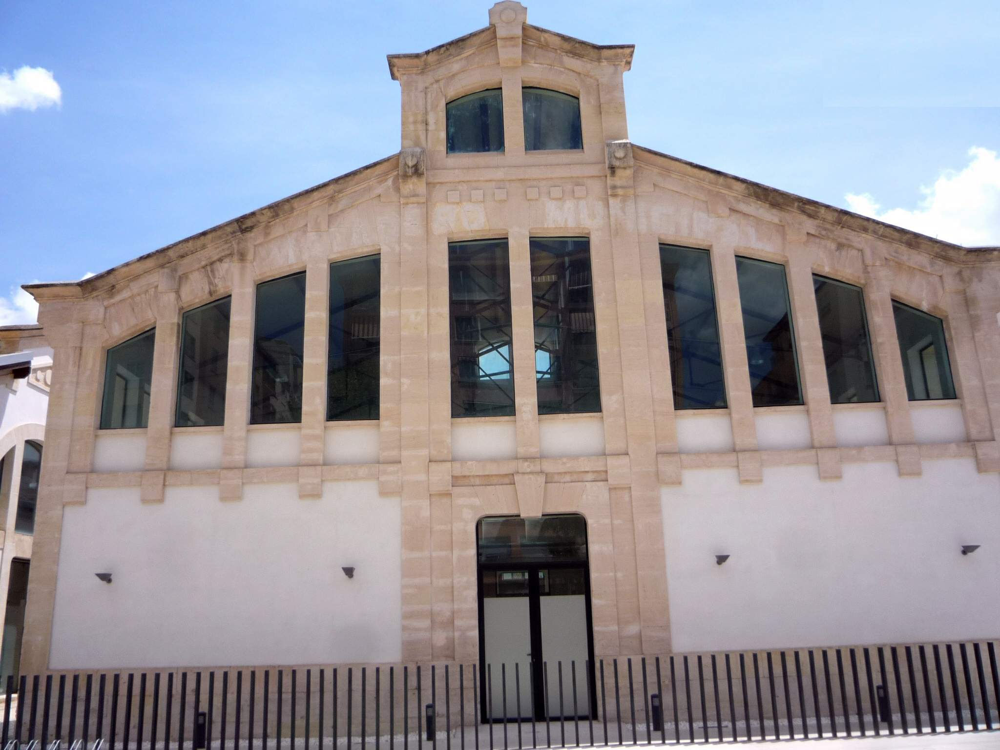 Complejo Deportivo Municipal 'Eduardo Latorre', antiguo Matadero de Alcoy (Alicante)